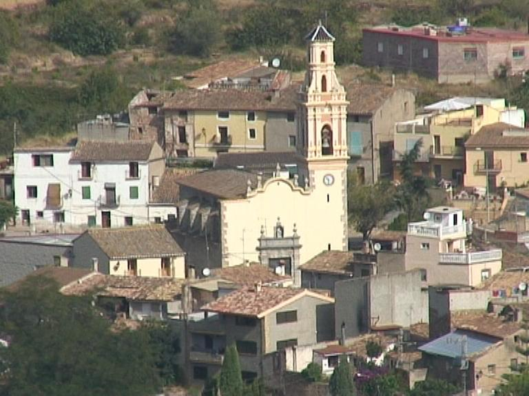 Església de Santa Anna d'Artesa vista des de Santa Bàrbera.